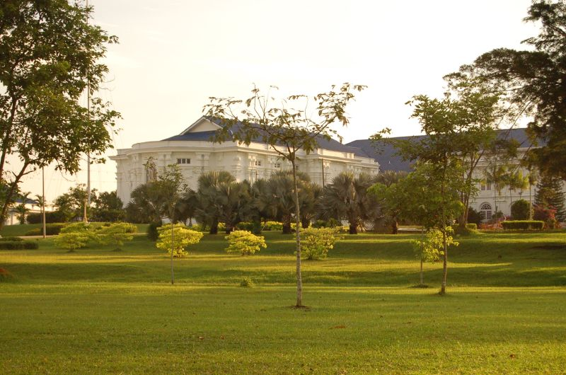 Sultan Abu Bakar's palace, Johor Bahru, Malaysia